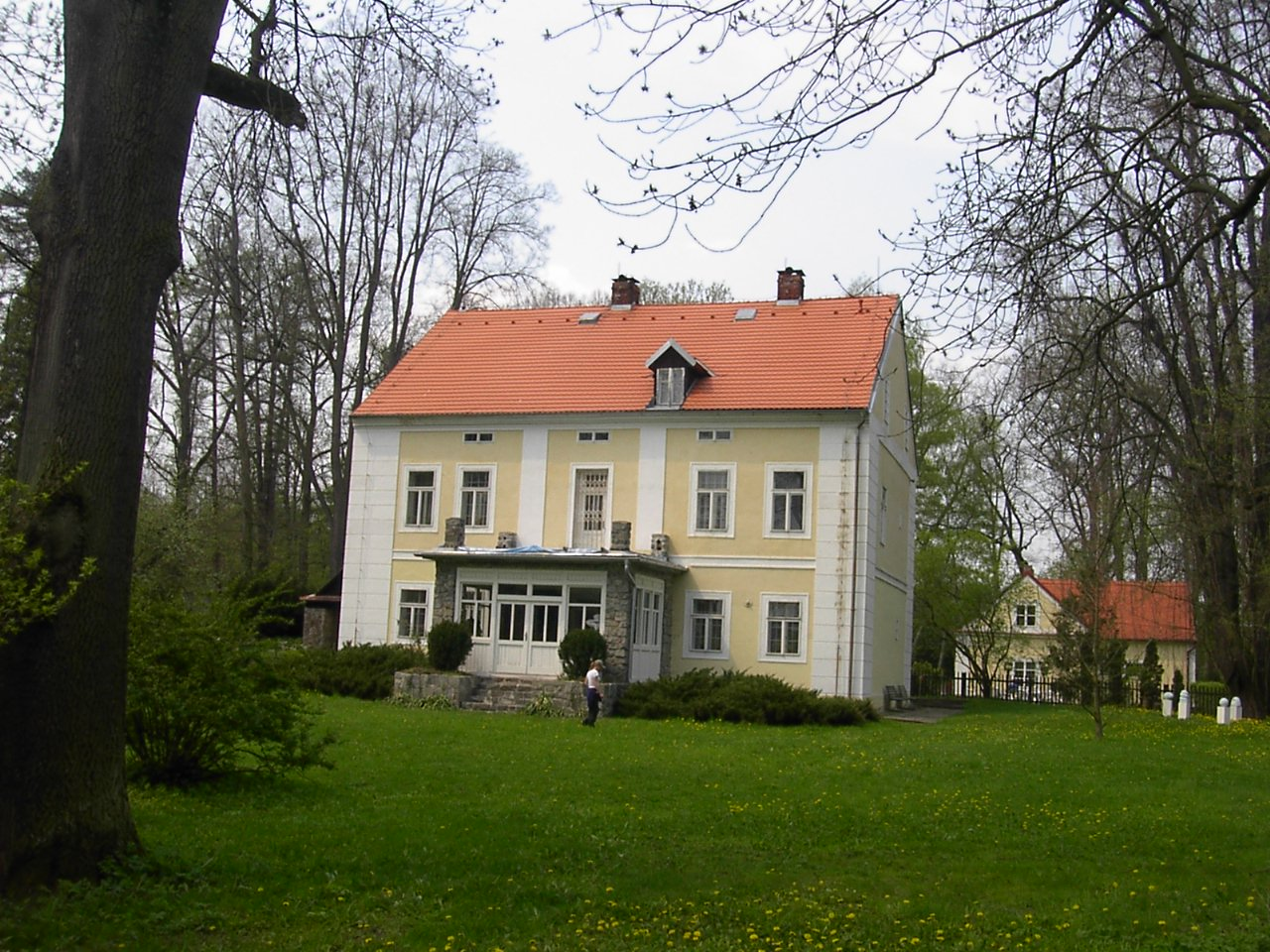 Strž u Staré Huti - bývalé letní sídlo Karla Čapka. (Ravine at the Old Iron Works - the former summer residence of Karl Capek)